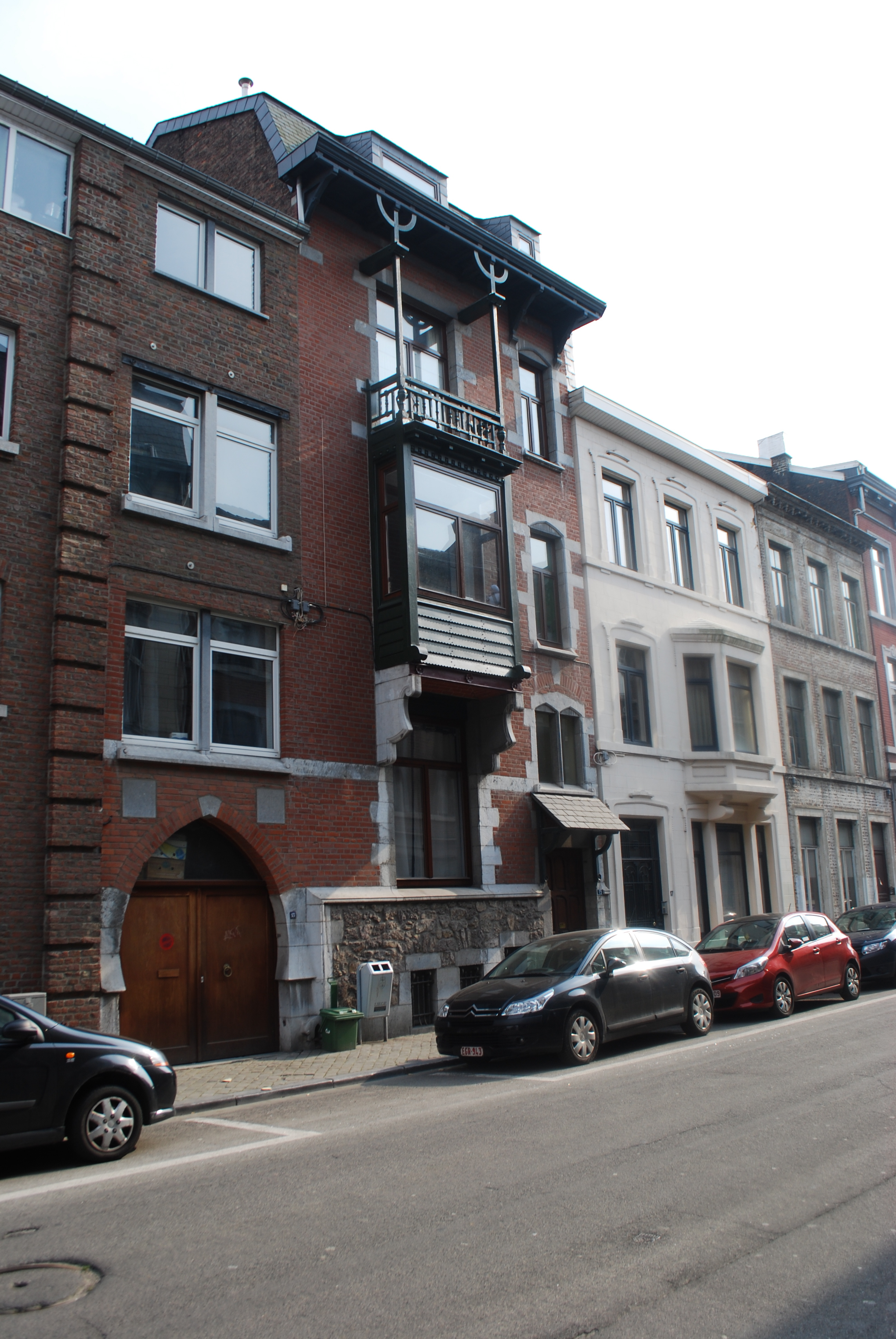 Vue de la rue Lambert le Bègue, dans le quartier de l'ancien béguinage à Liège.